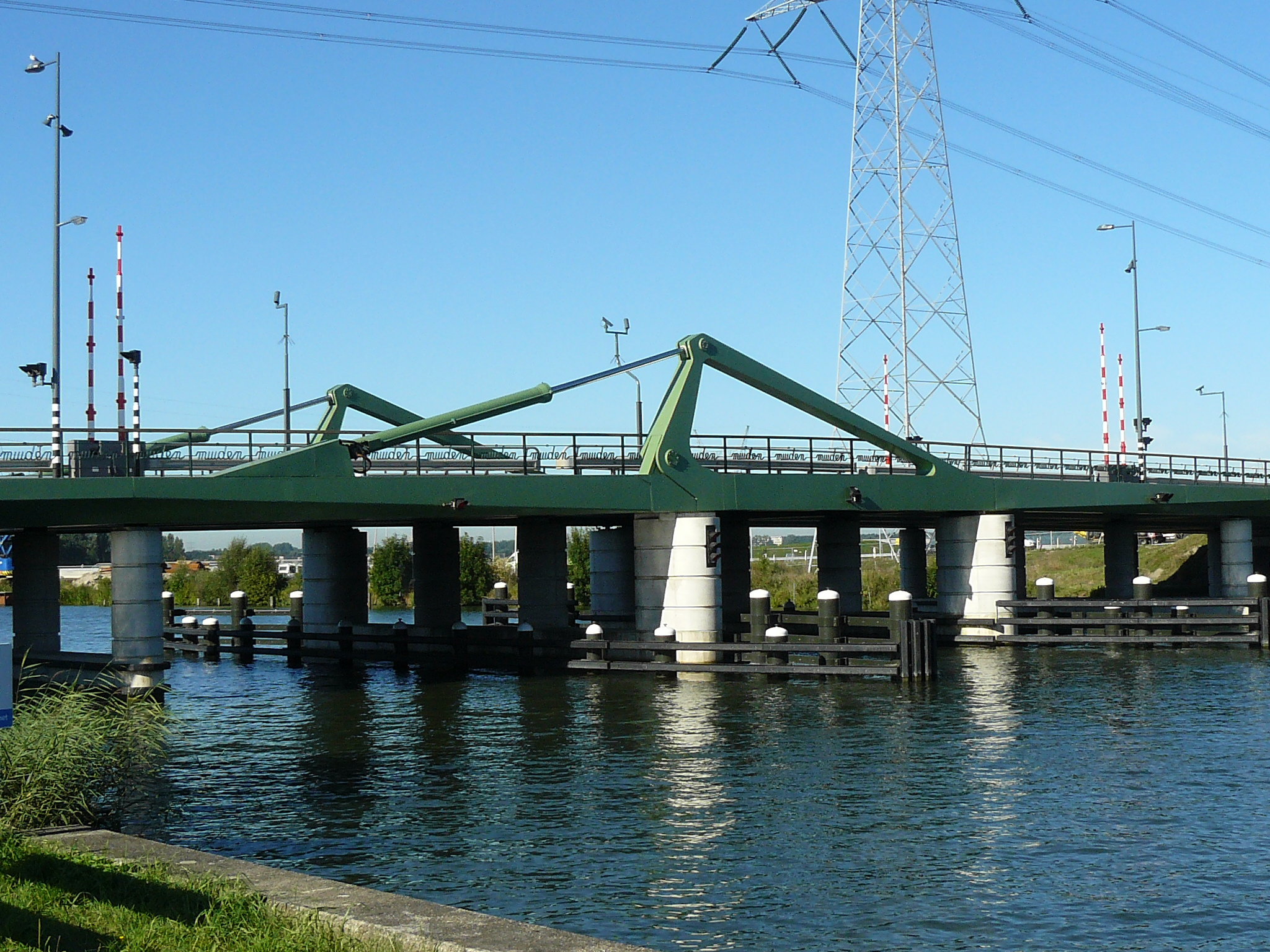 De Spieringbrug over de Vecht bij Muiden is bedoeld voor lokaal verkeer van Muiden en Weesp en werd op 18 september 2015 officieel geopend.